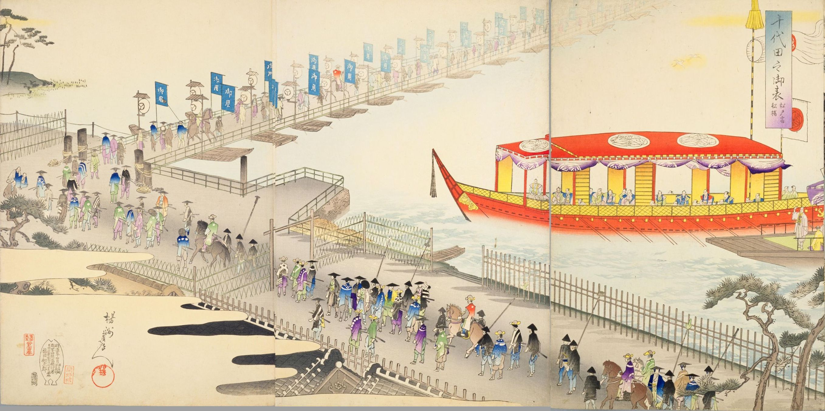 楊洲周延による錦絵3枚続。NDL版を元に3ページを連結して合成。